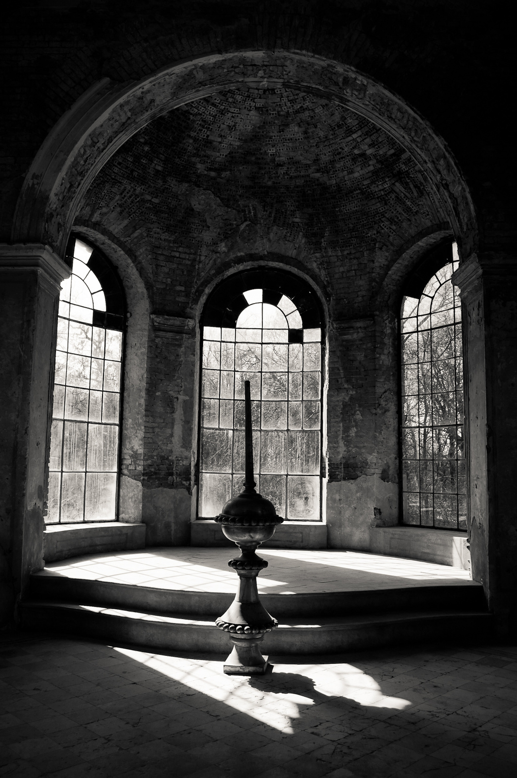 Schossberger-kastély (Tura, Kossuth u.)